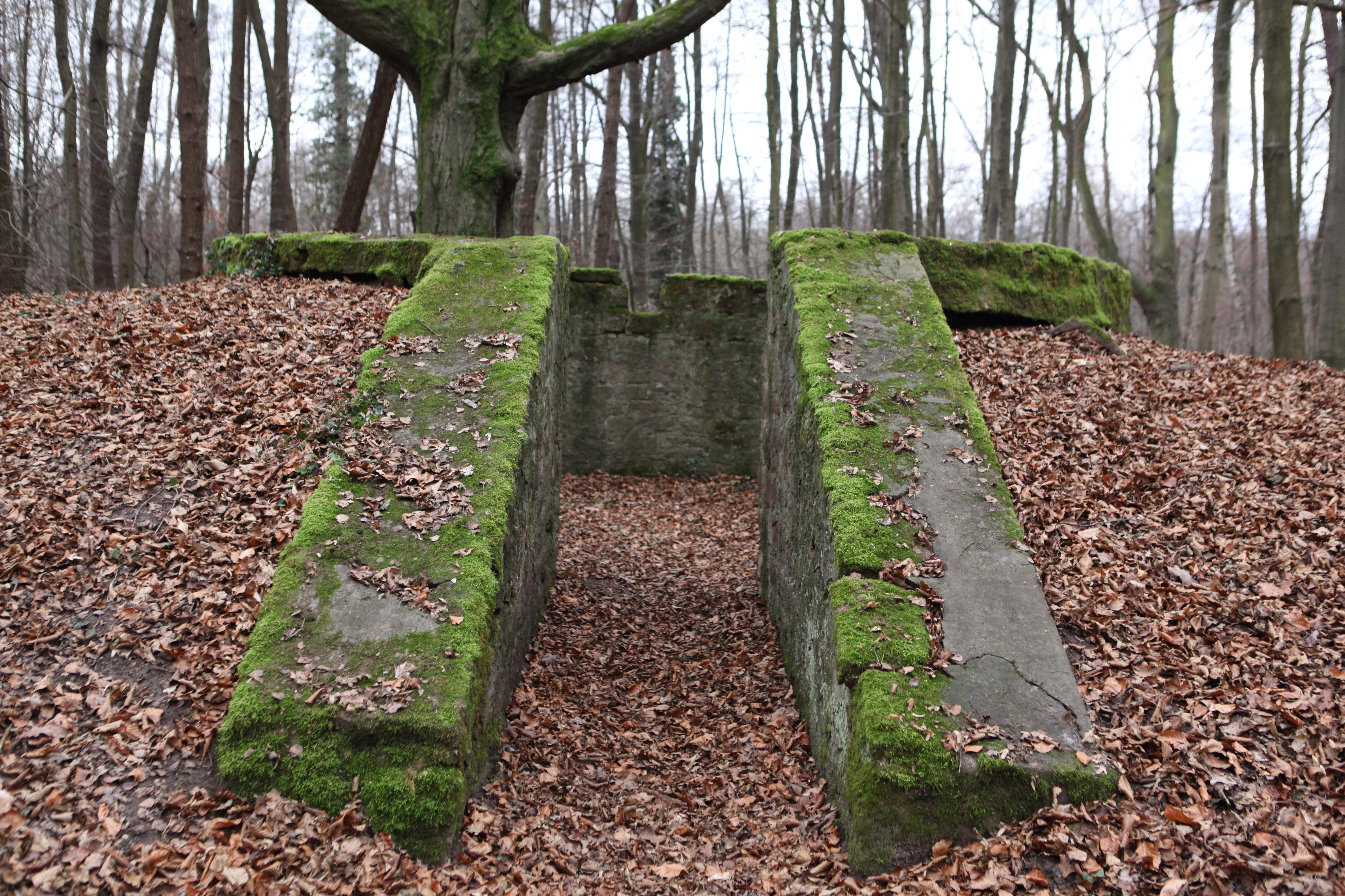 Darmstadt-Jagdschirm-Charlottenplatz